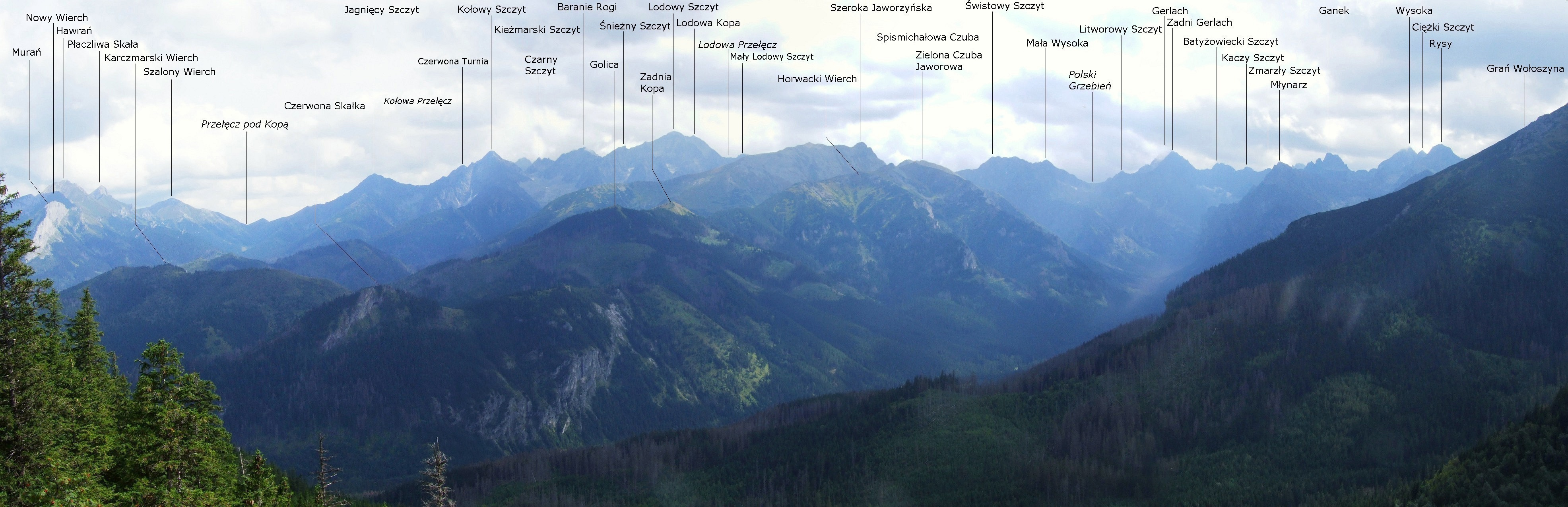 Panorama z Gęsiej Szyi